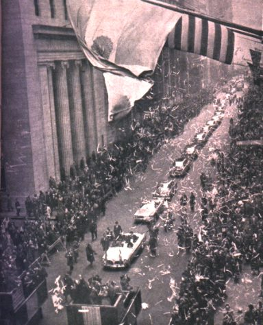 Es una foto del presidente Arturo Frondizi, en una visita a los Estados Unidos.